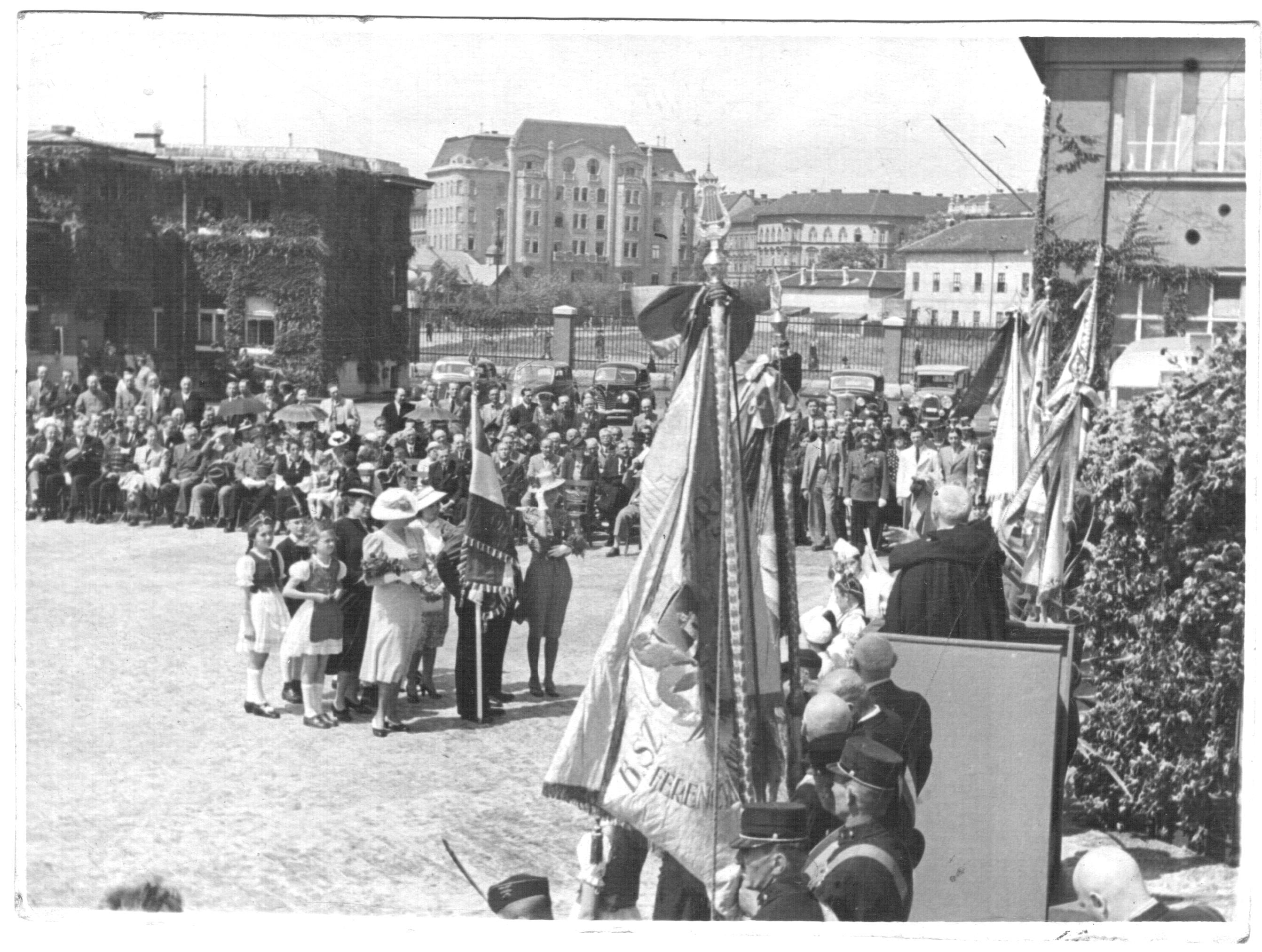 Ismeretlen fényképész felvétele. Mérete 12x10 cm. Papír. (Scanned by Derzsi Elekes Andor). Budapest, cca 1940, ünnepség. ©© Derzsi Elekes Andor, Budapest, 2013, You are authorised to use these photos and vids under Creative Commons – even for commercial, for profit purposes. Photos must be attributed to Derzsi Elekes Andor. All of the photos and vids in the Metapolisz DVD line are under Creative Commons and can be used even for commercial – for profit – purposes. Recommended Citation Derzsi Elekes Andor: Metapolisz DVD line